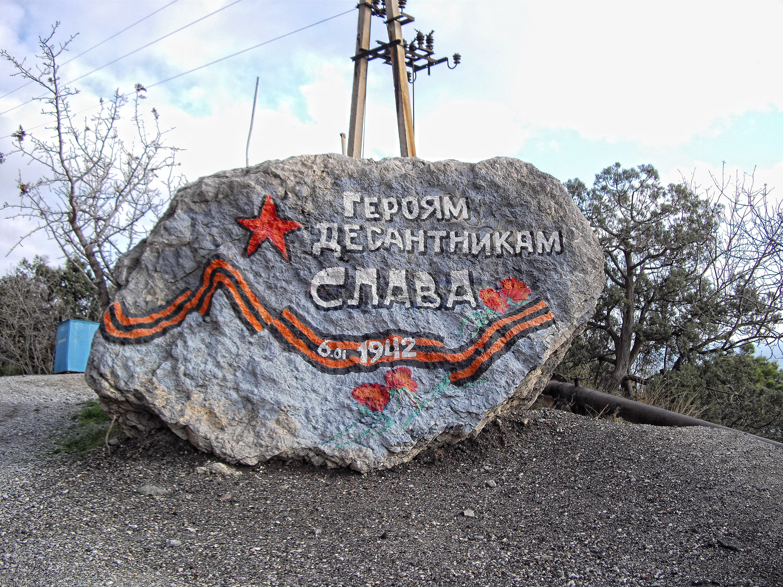 Памятник Судакскому десанту под горой Сокол.